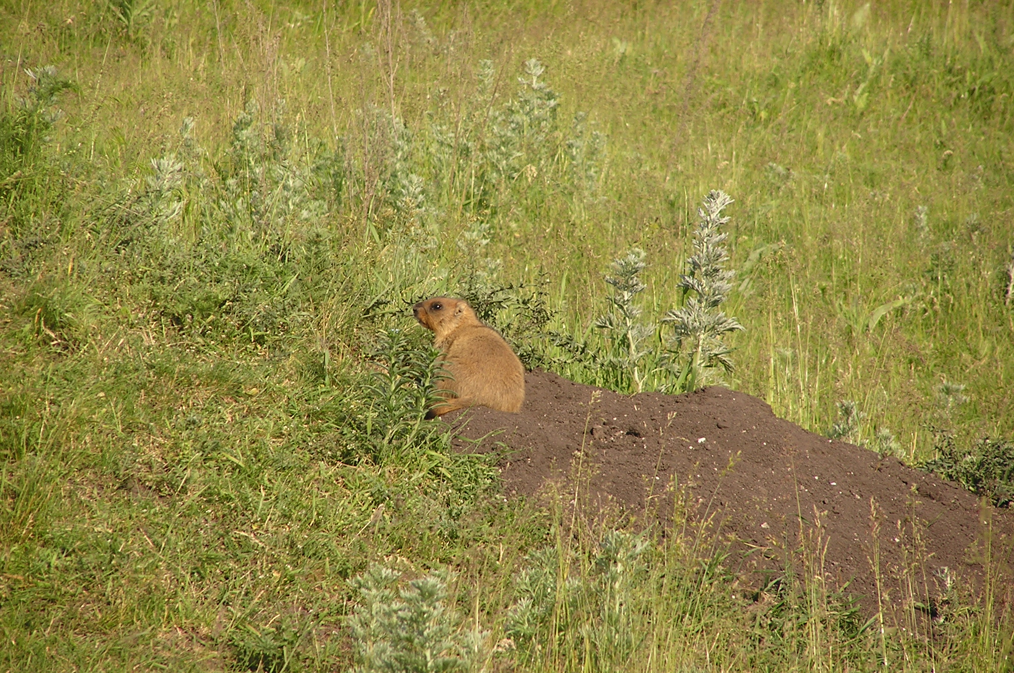 Сурок-байбак в балке Каблейка Красненского р-на Белгородской обл